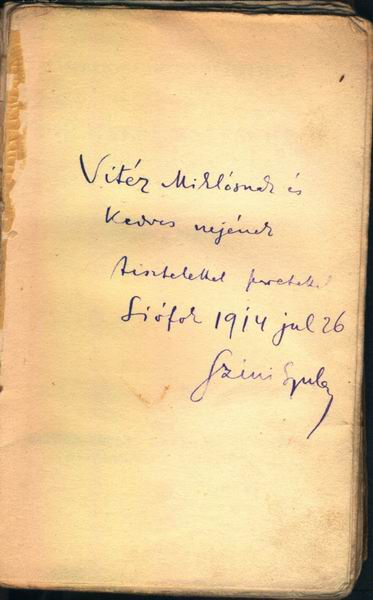 Szini Gyula kézírása. Magam szkenneltem saját, eredeti példányomról